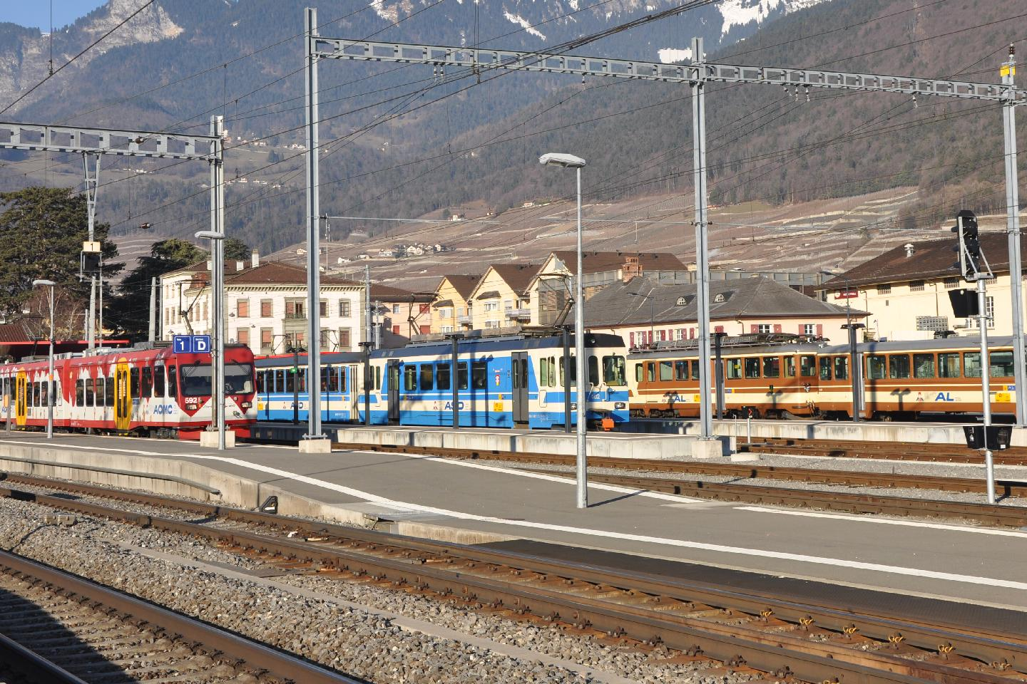 Gemeinsamer Endpunkte der Transports Publics du Chablais (TPC): Aigle. Im Vordergrund links rot/cremer Doppeltriebwagen mit gemischtem Adhäsions- und Zahnradantrieb der Bahnstrecke Aigle–Ollon–Monthey–Champéry. In der Mitte blau/cremer Pendelzug der Bahnstrecke Aigle-Sépey-Diablerets. Im Hintergrund braun/cremer Pendelzug mit gemischtem Adhäsions- und Zahnradantrieb der Bahnstrecke Aigle–Leysin.